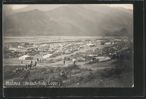 Немско-български военен лагер край Удово през Първата световна война.